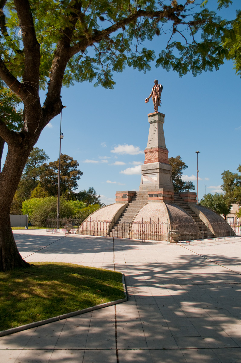 Monumento a Artigas (San José). Ubicada en el departamento de San José